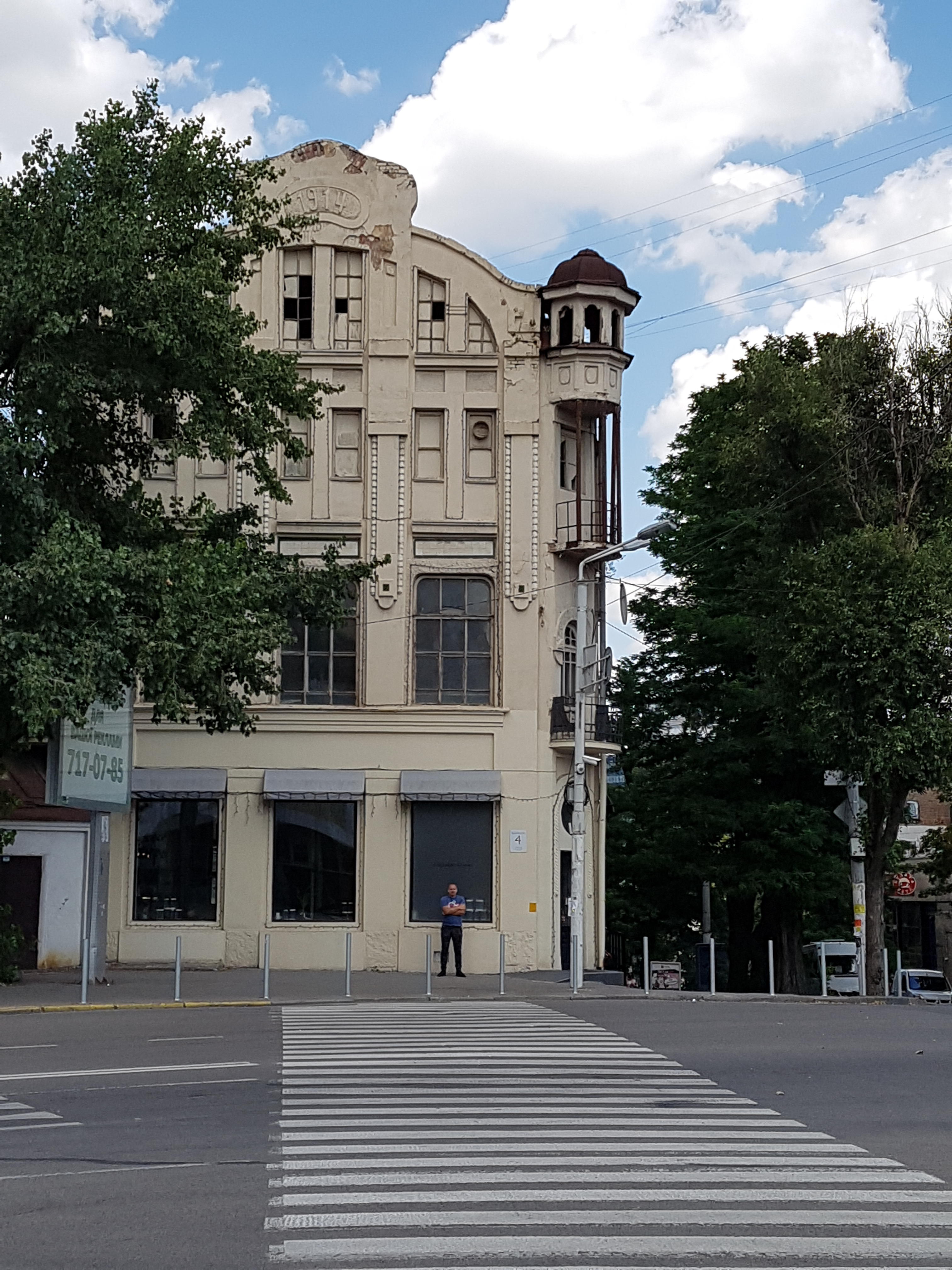 Кондитерська фабрика Лур'є, Дніпро, вул. М. Грушевського (К. Лібкнехта), 4